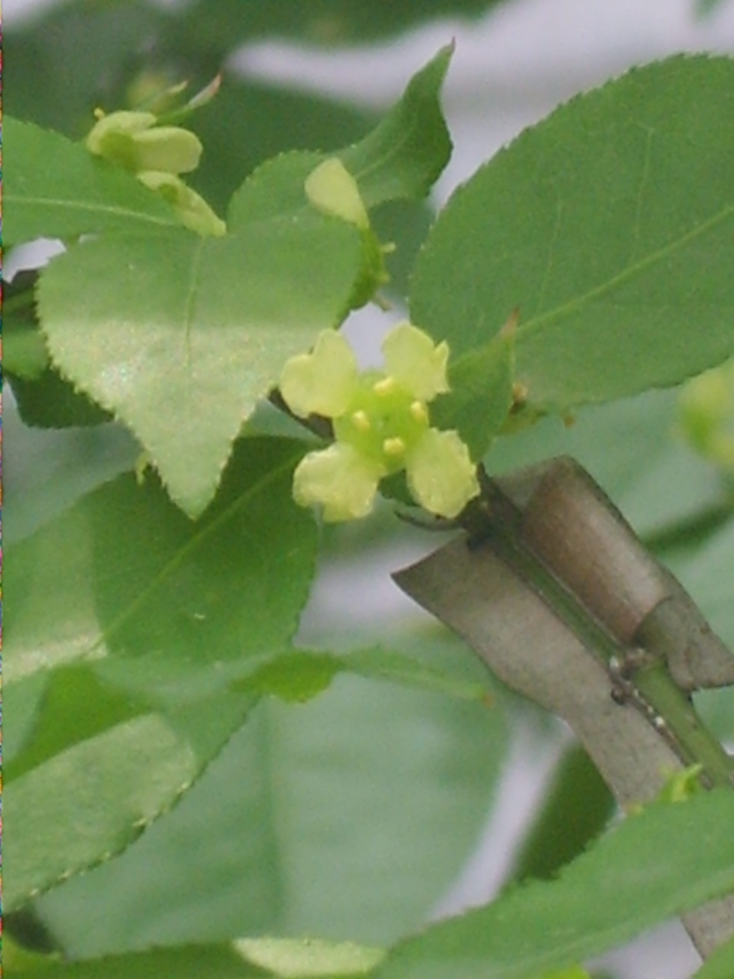 Euonymus alatus in Yongsan Korea. 남영역에서 용산고 가는 길 상가 화단에 사는 화살나무